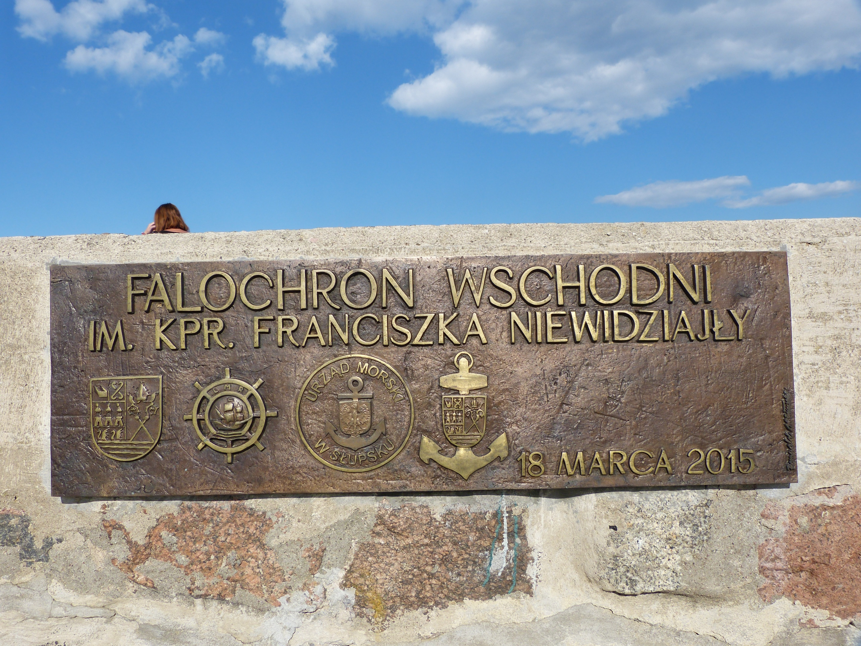 Tablica pamiątkowa na falochronie portowym w Kołobrzegu poświęcona kpr. Franciszkowi Niewidziajło, który 18 marca 1945 r. dokonał symbolicznych zaślubin morza z Polską.